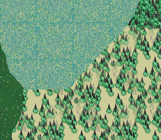 Zu sehen sind vier Formen der Vegetationsdarstellung.